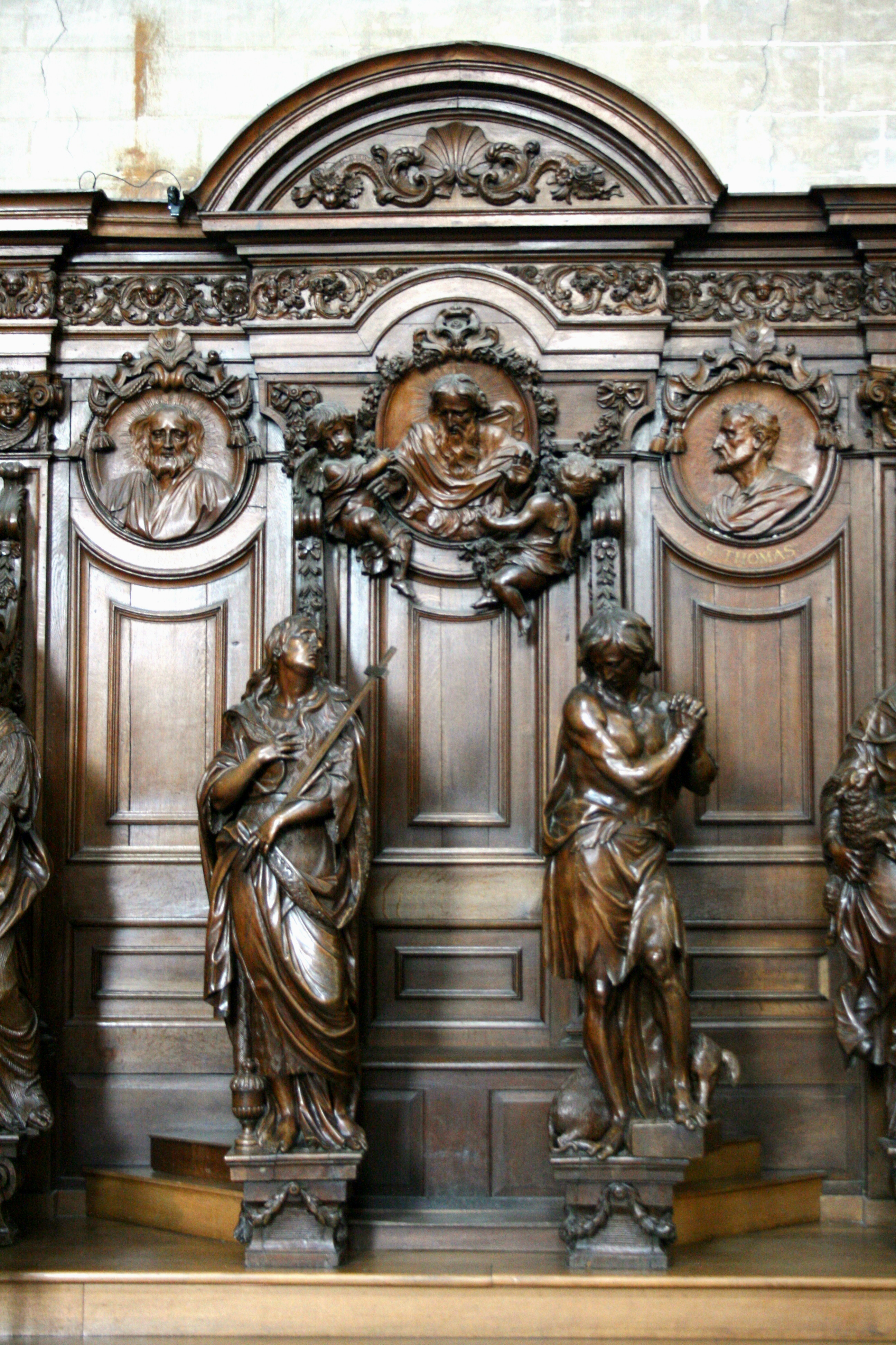 Sint-Servaasbasiliek, Grimbergen, Vlaams-Brabant, België. Biechtstoel